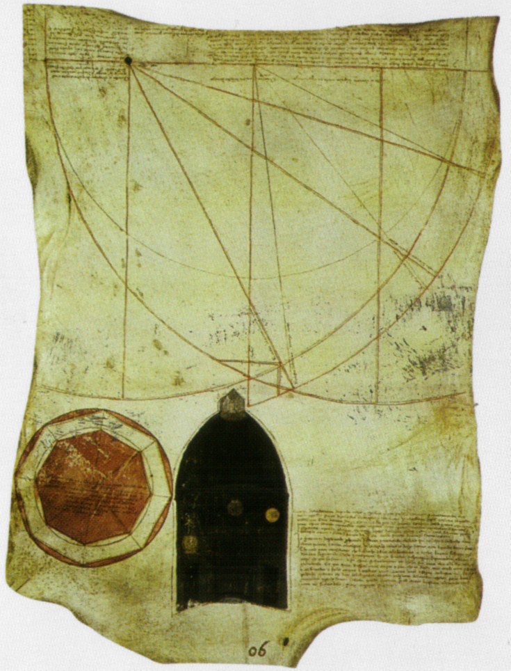 Giovanni di gherardo da prato, disegno con osservazioni sul tracciamento della Cupola di SMF, 1426, archivio di stato di Fi, inv. mostra 158.jpg